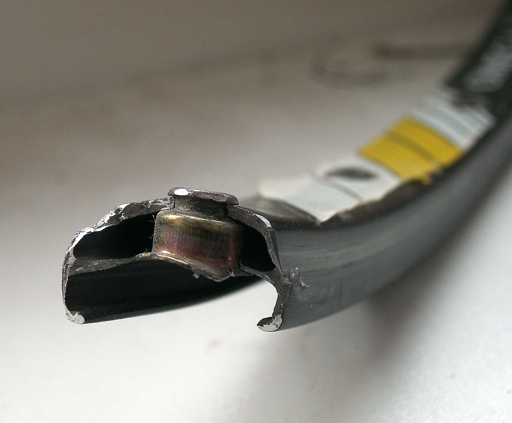 Querschnitt einer Fahrradfelge